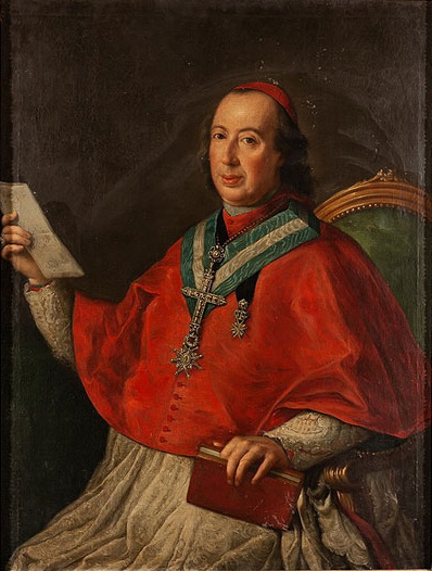 Antonio Despuig y Dameto (1745-1813). Óleo sobre tela, 103.5 x 79 cm.